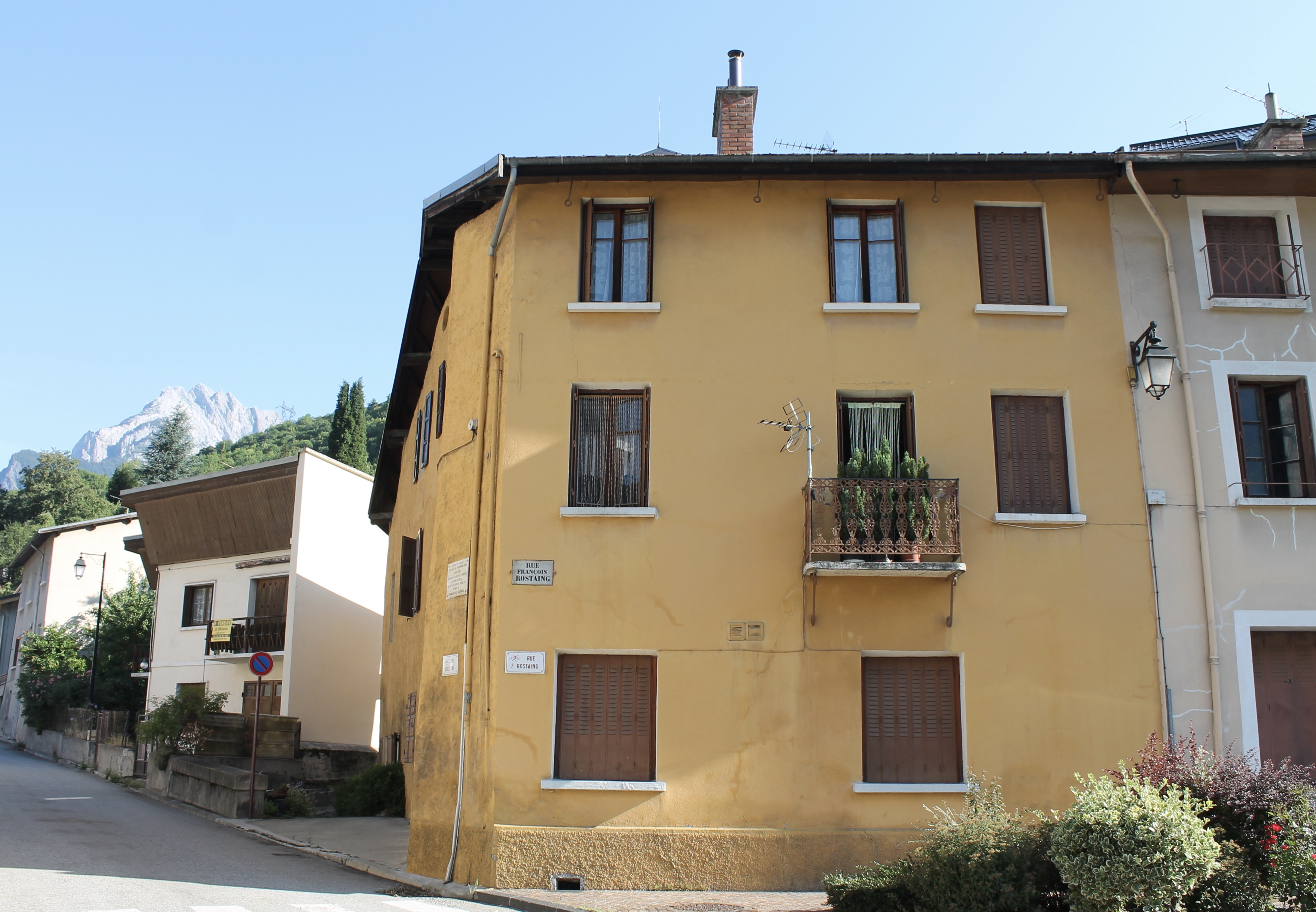 Maison de naissance du général Gustave Ferrié (août 2018).